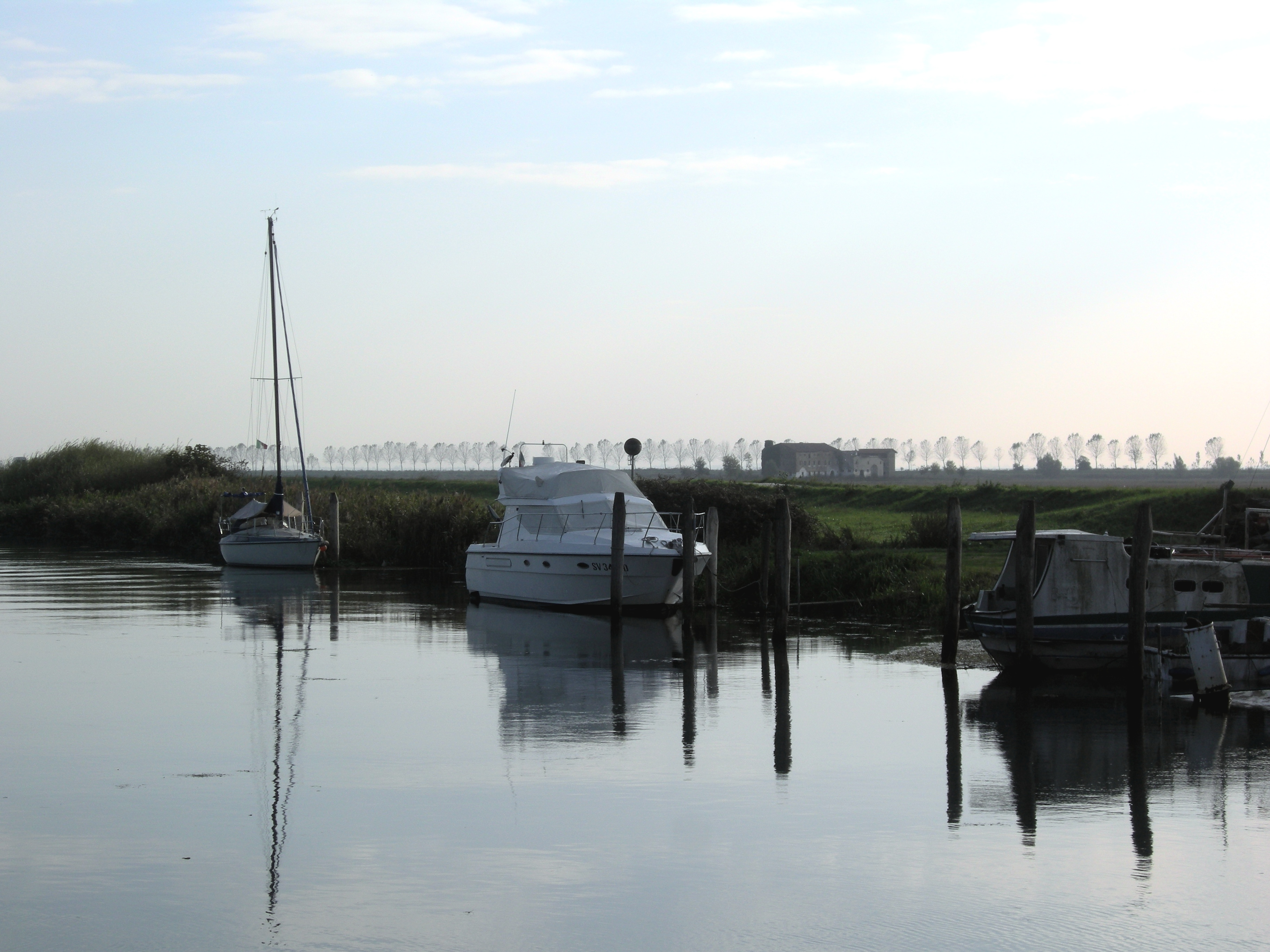 Cervellin, opera propria, Sile a Portegrandi (VE) italy, lic. GFDL, data 27.10.2009